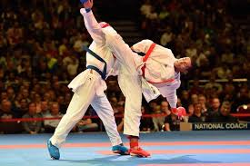 Victoire de Rolle William en finale des championnats du mondes 2014